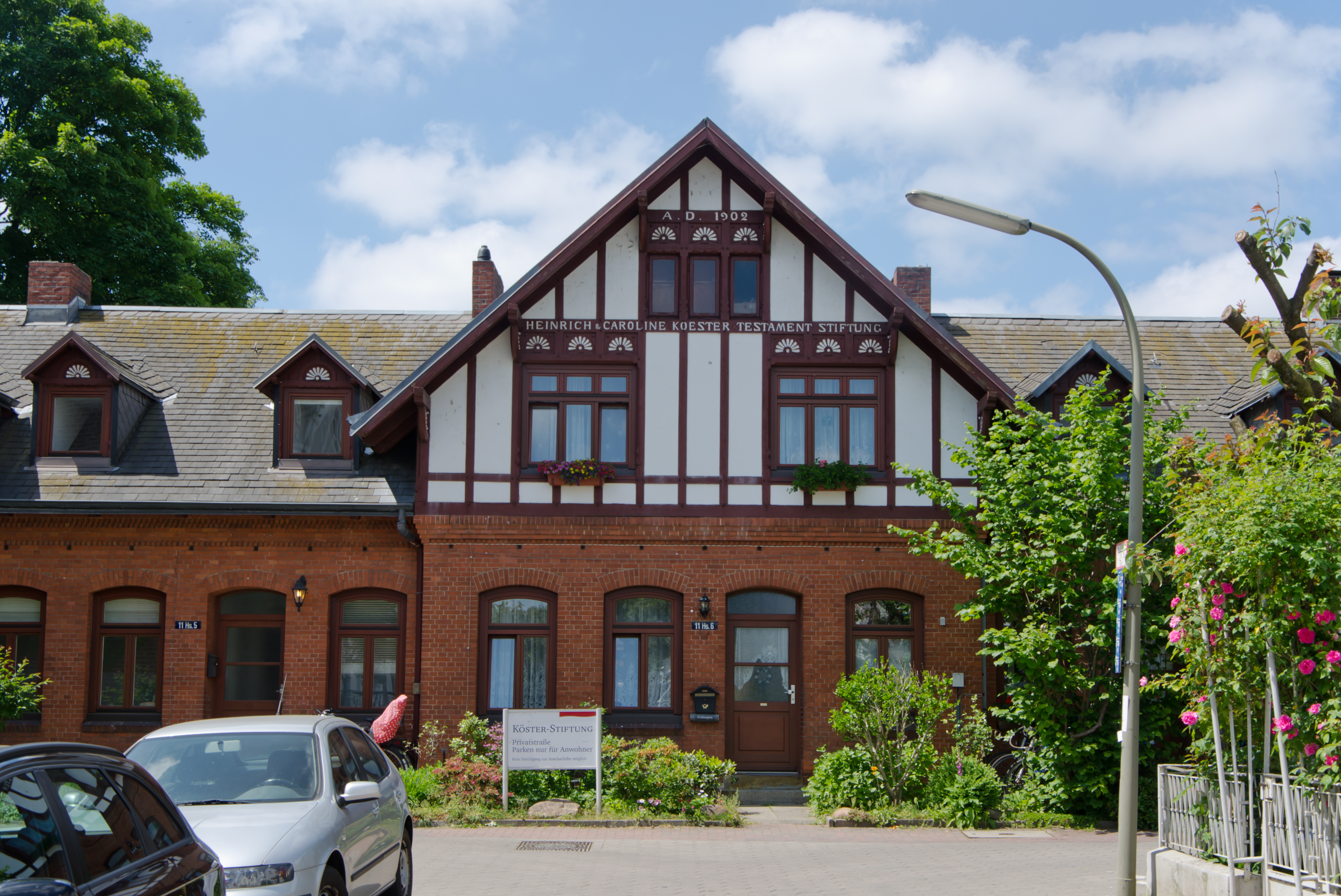 Köster-Stiftung Kösterstraße 11 Haus 6